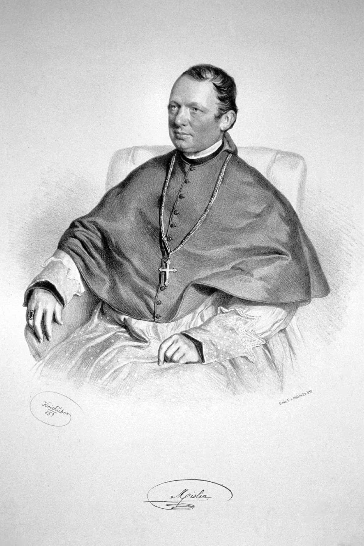 Jakob Mislin (1807-1878), Priester, Erzieher Kaiser Franz Josefs und seiner Brüder. Lithographie von Josef Kriehuber, 1853